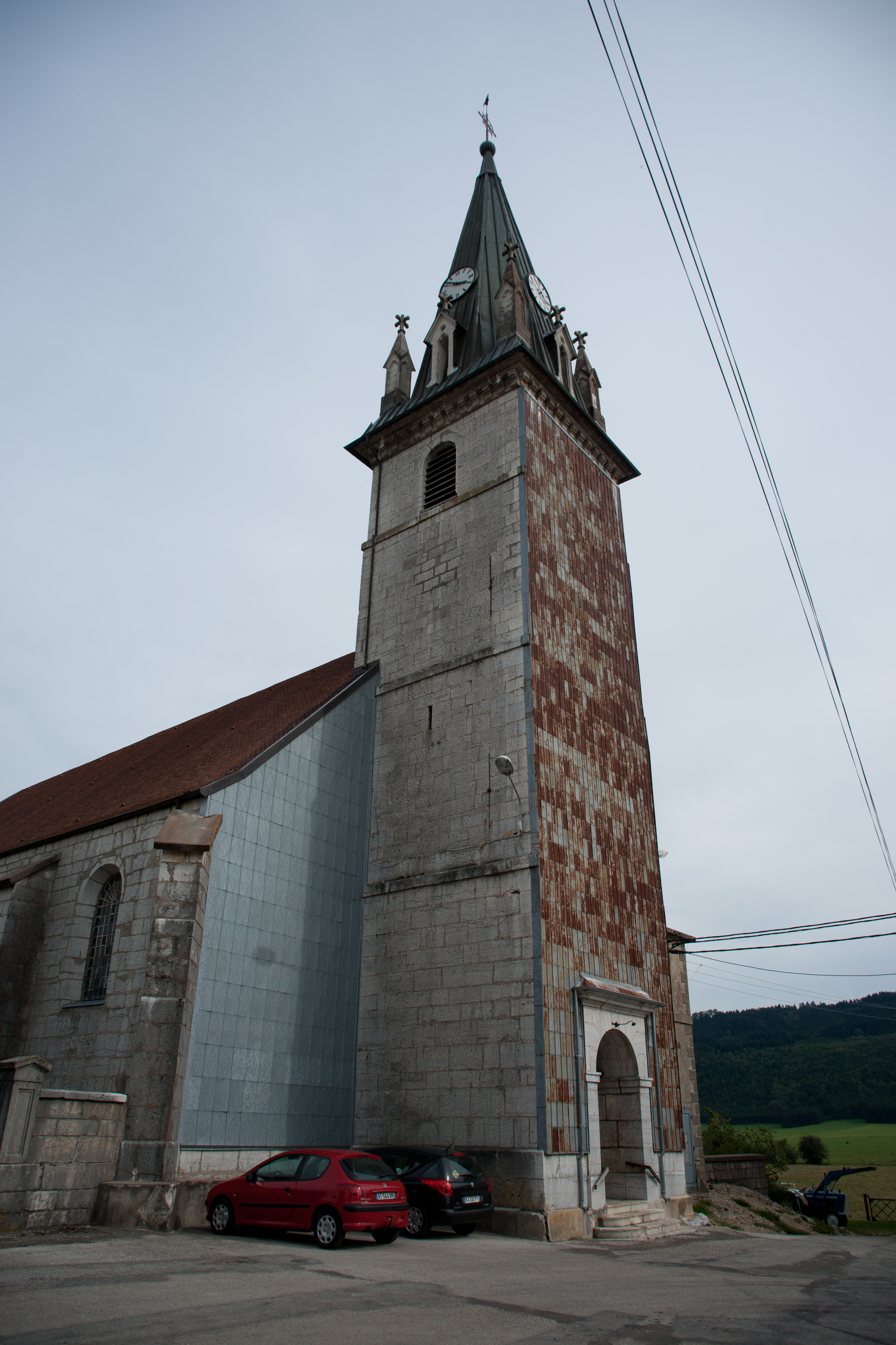 Arc-sous-Cicon - église